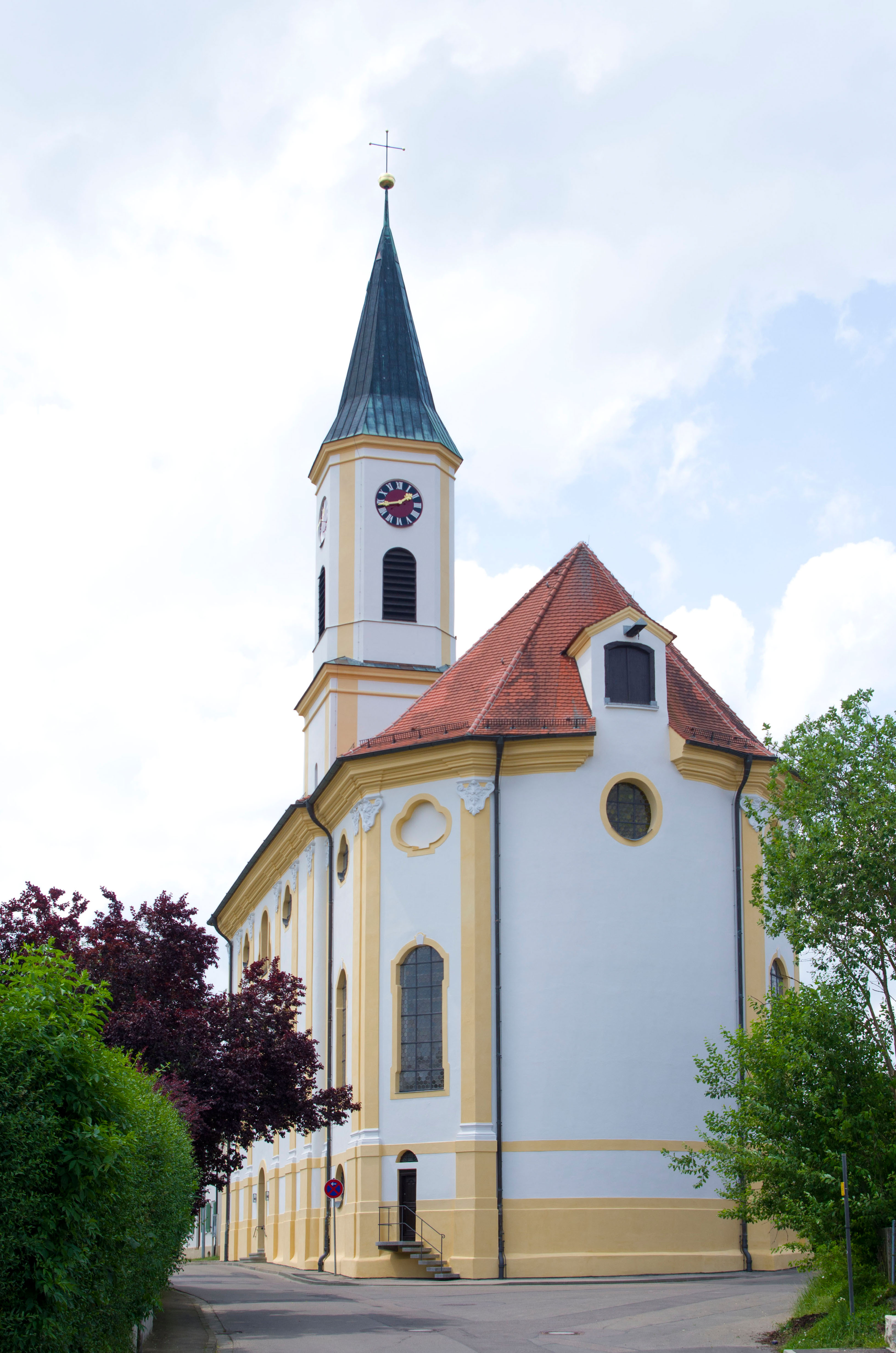 Wallfahrtskirche Mariä Geburt in Senden-Witzighausen nach der Renovierung